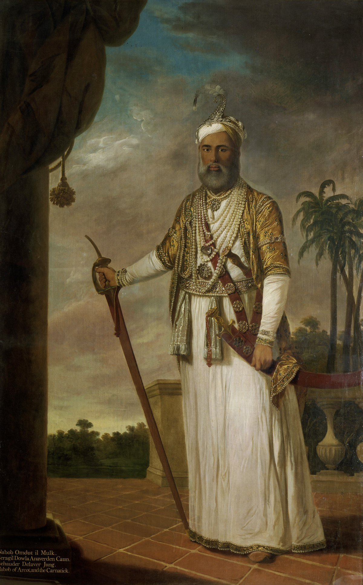 Muhammad Ali Khan (1717/1718–1795), Nawab of Arcot